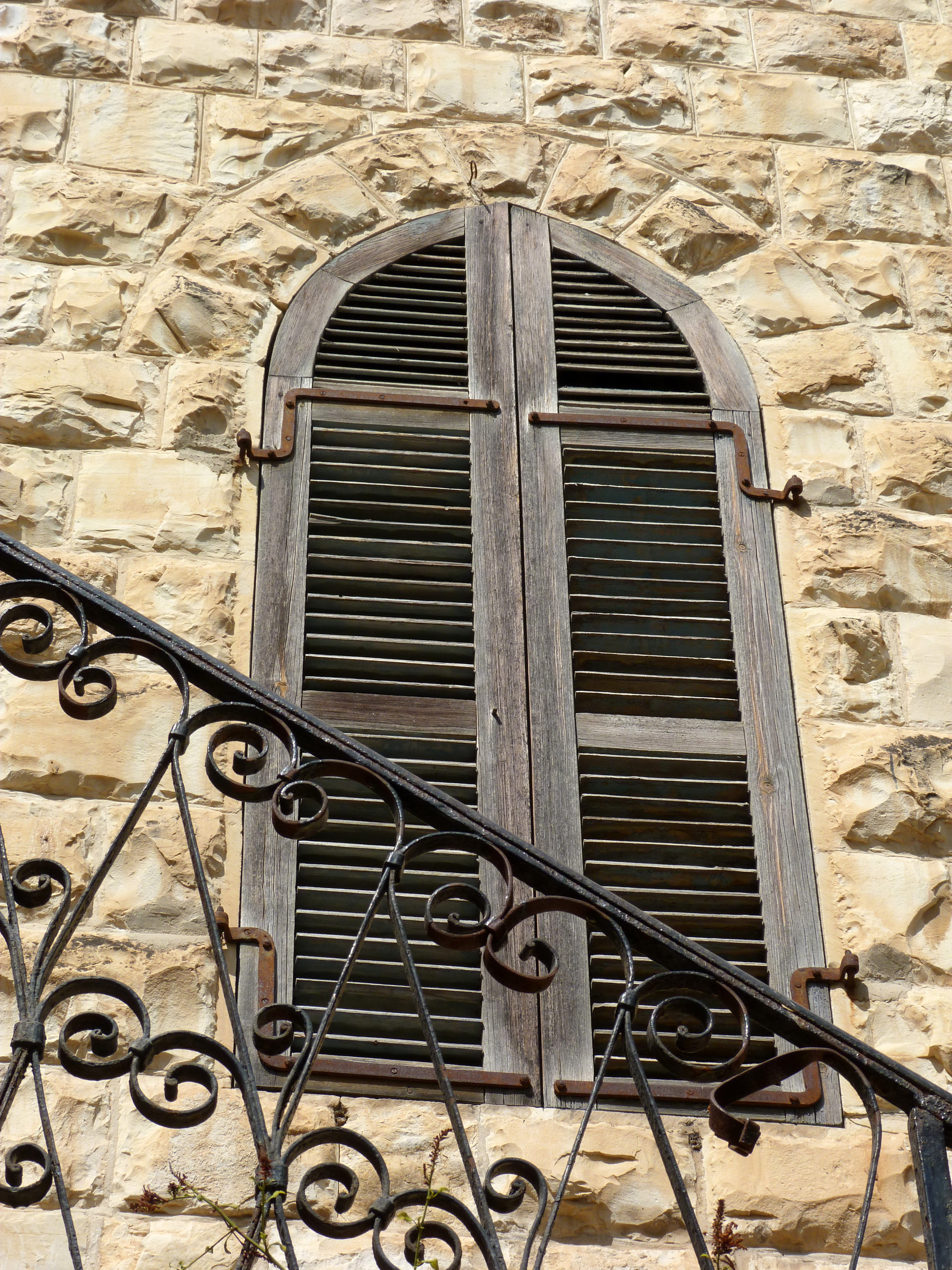 בית הרמן שטרוק, רח' ארלוזרוב 23, חיפה